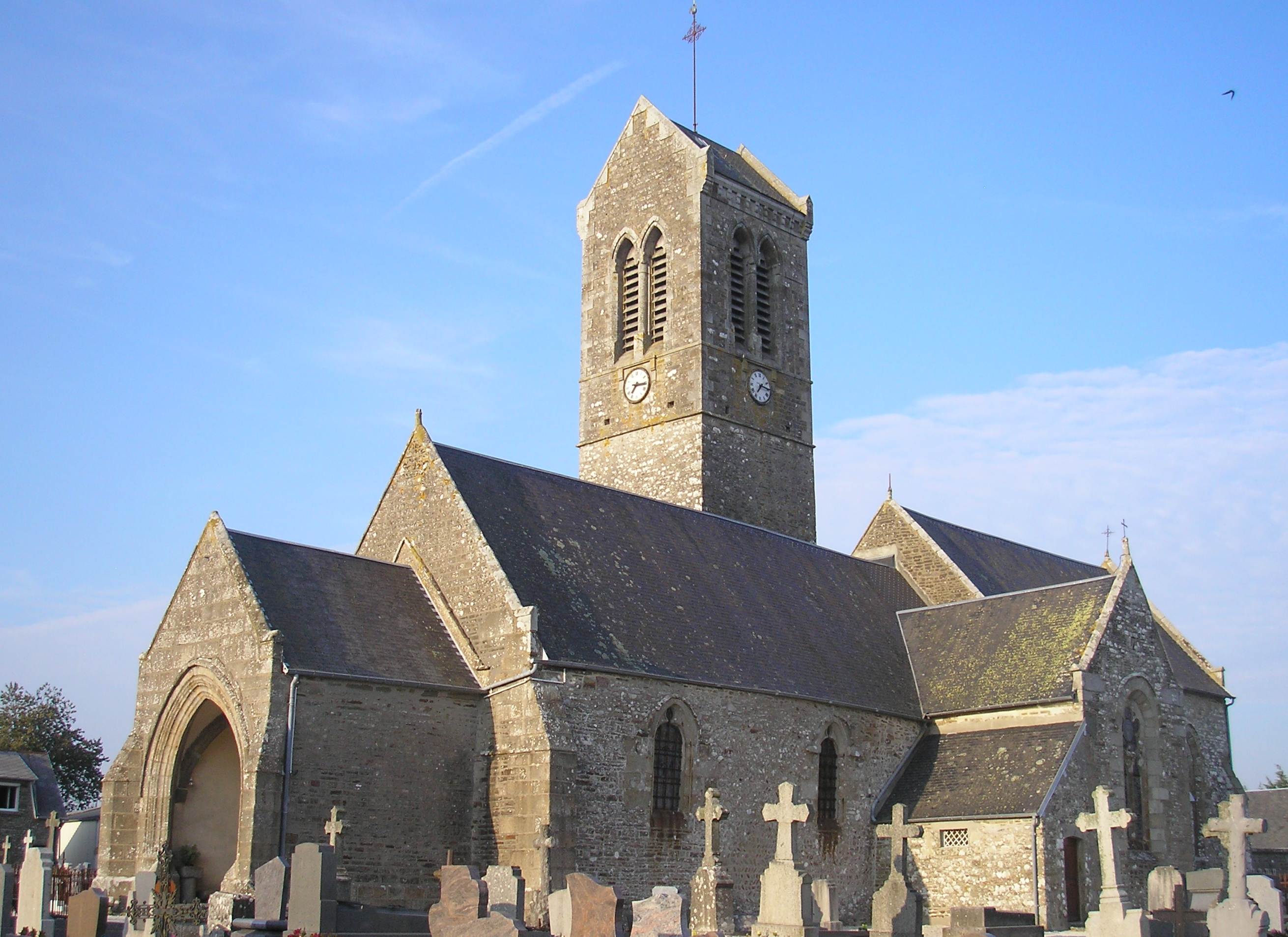 Fleury (Normandie, France). L'église Notre-Dame.